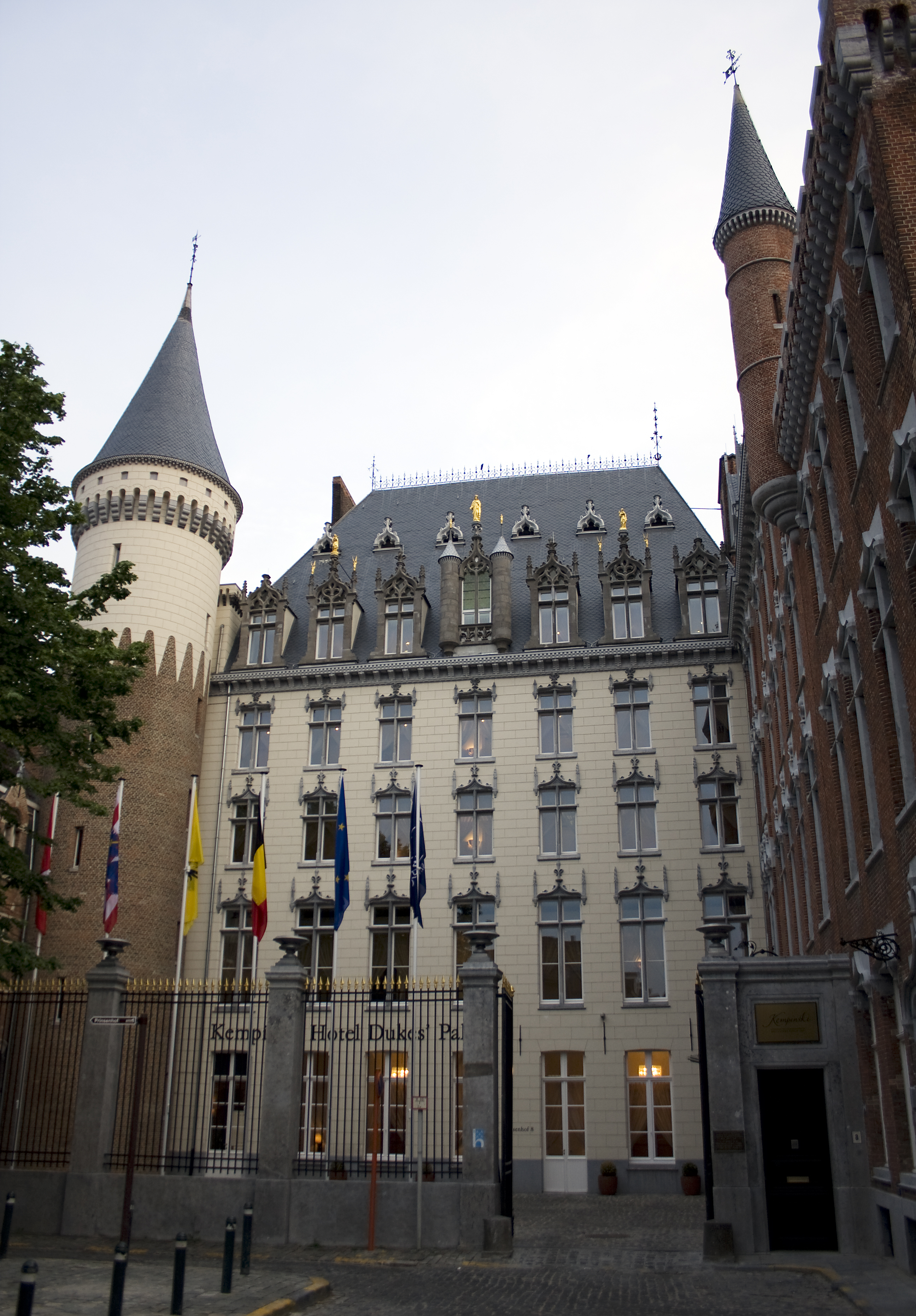 Het Prinsenhof in Brugge (nu het Kempinski Hotel Dukes' Palace)